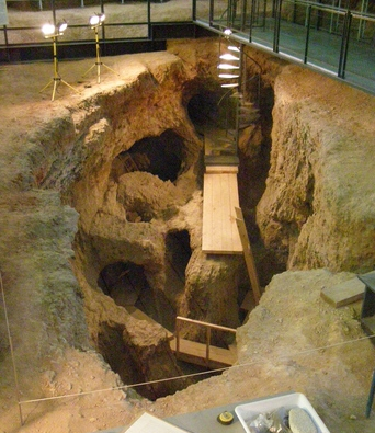 Minas de Gavà.